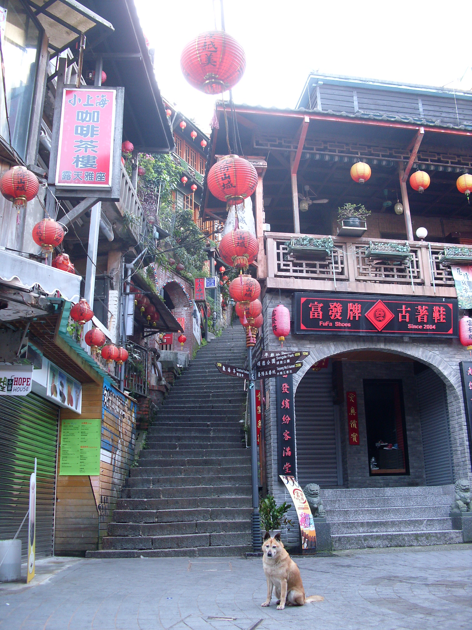 Bân-lâm-gú: 下早仔欲八點，九份徛崎路(豎崎路)佮輕便路路口，猶無啥儂，顧路的這隻狗，在地儂叫伊[小黃]，敢若是阿妹茶樓的儂飼的。